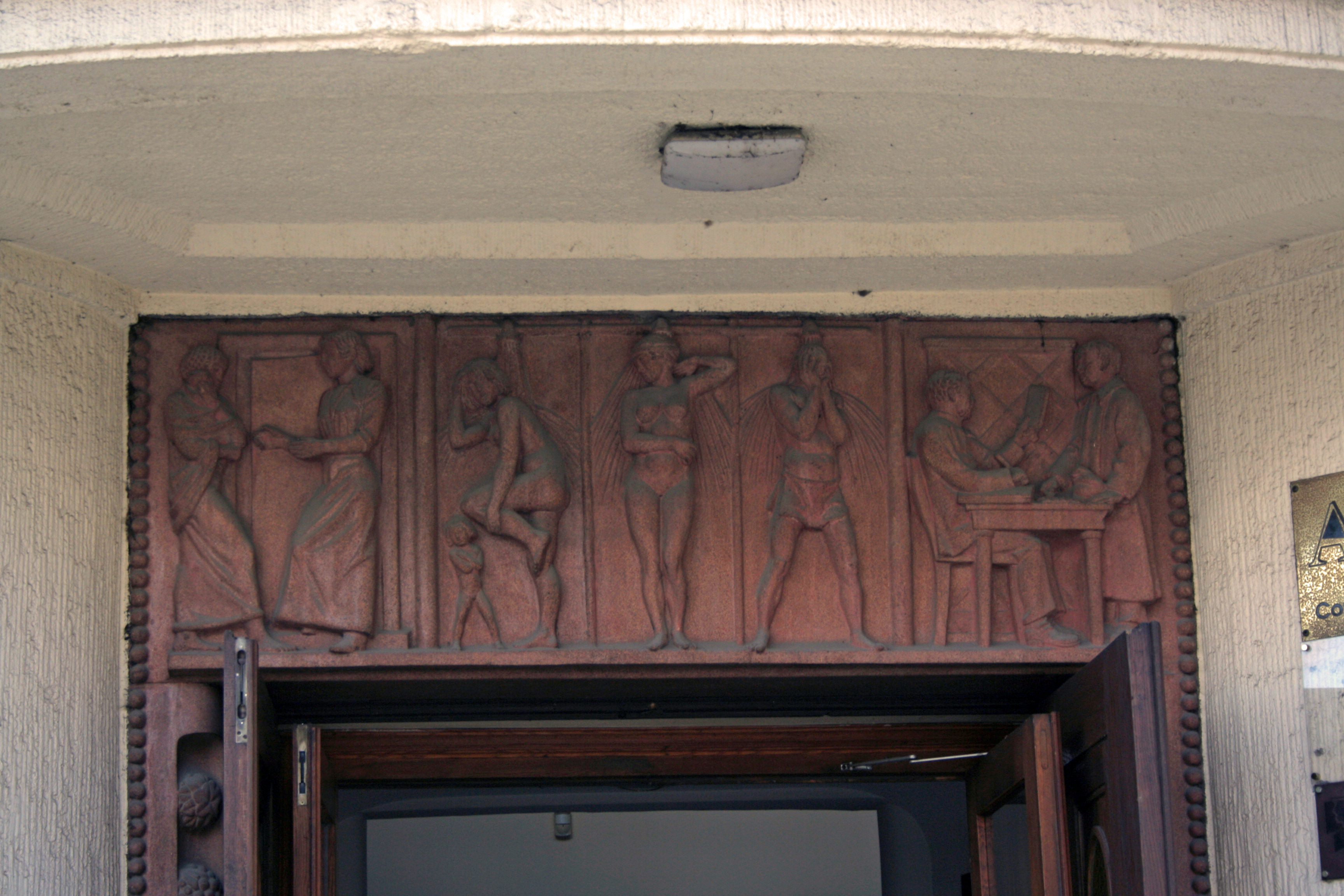 Relief zdobiący wejście do łaźni we Wrocławiu